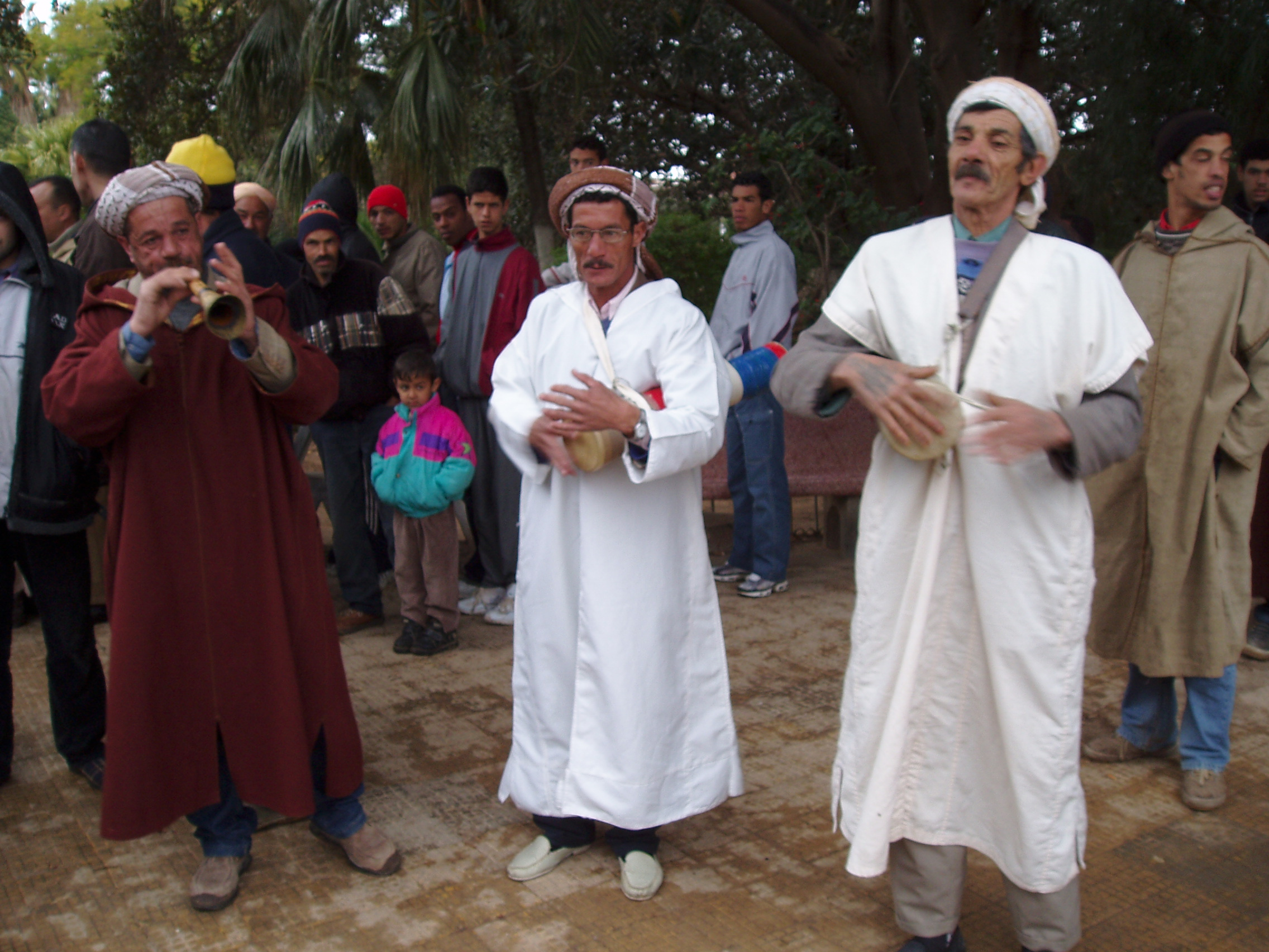 Groupe de musiciens Glayliya nord algérie ouest This is an image of Cultural Fashion or Adornment from Algeria